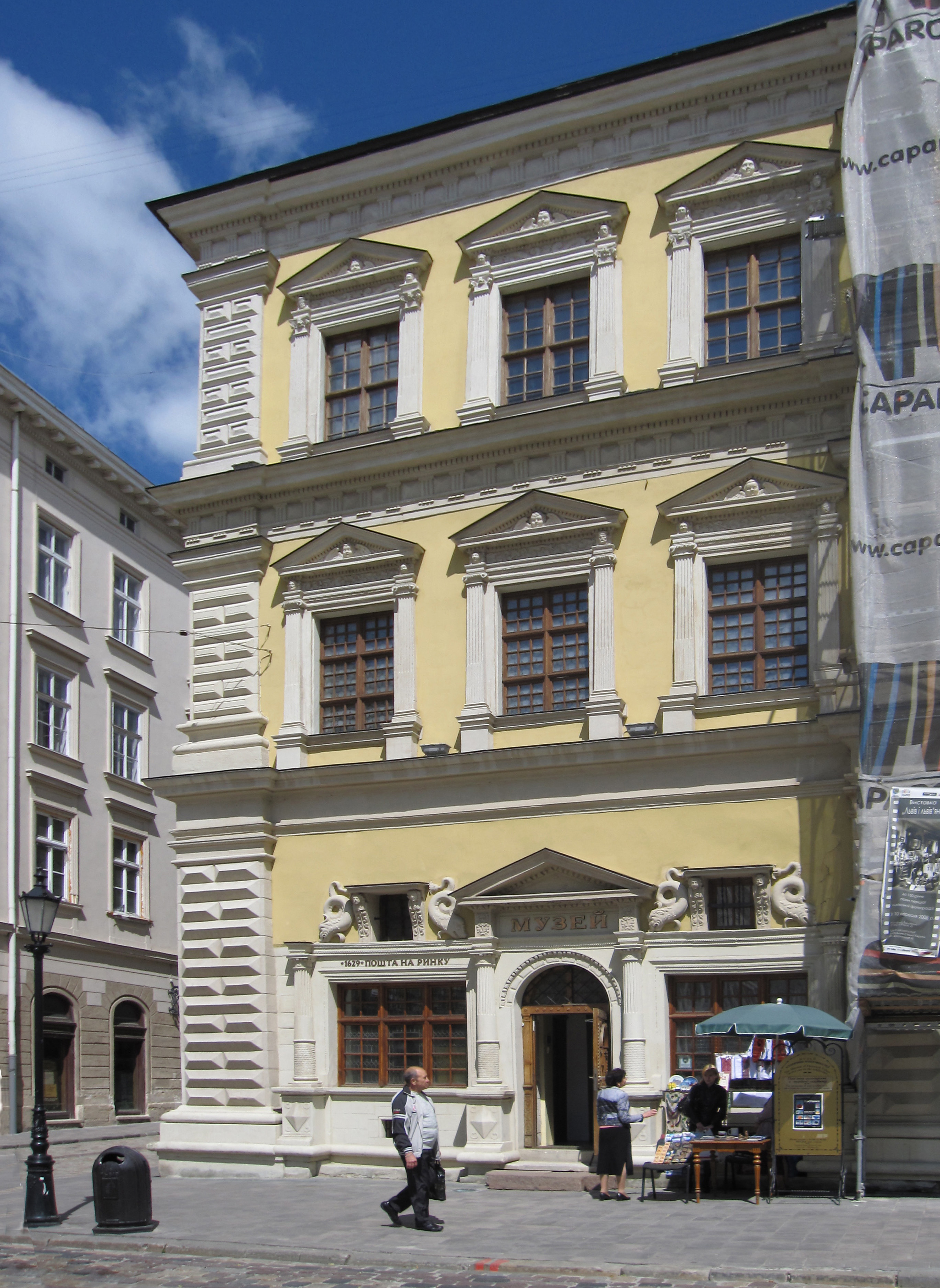 Rynek of Lwow